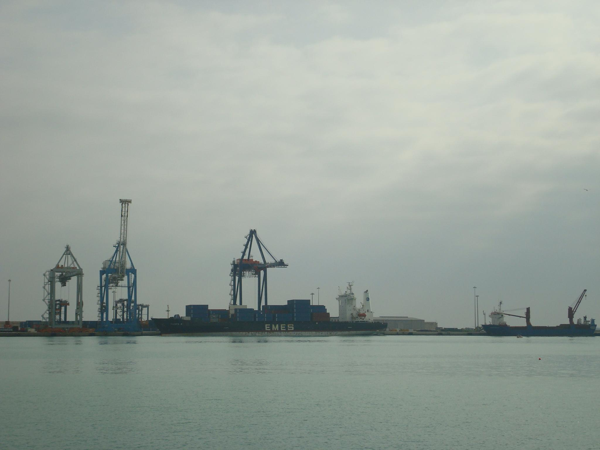 Buques de carga en el puerto de Castellón